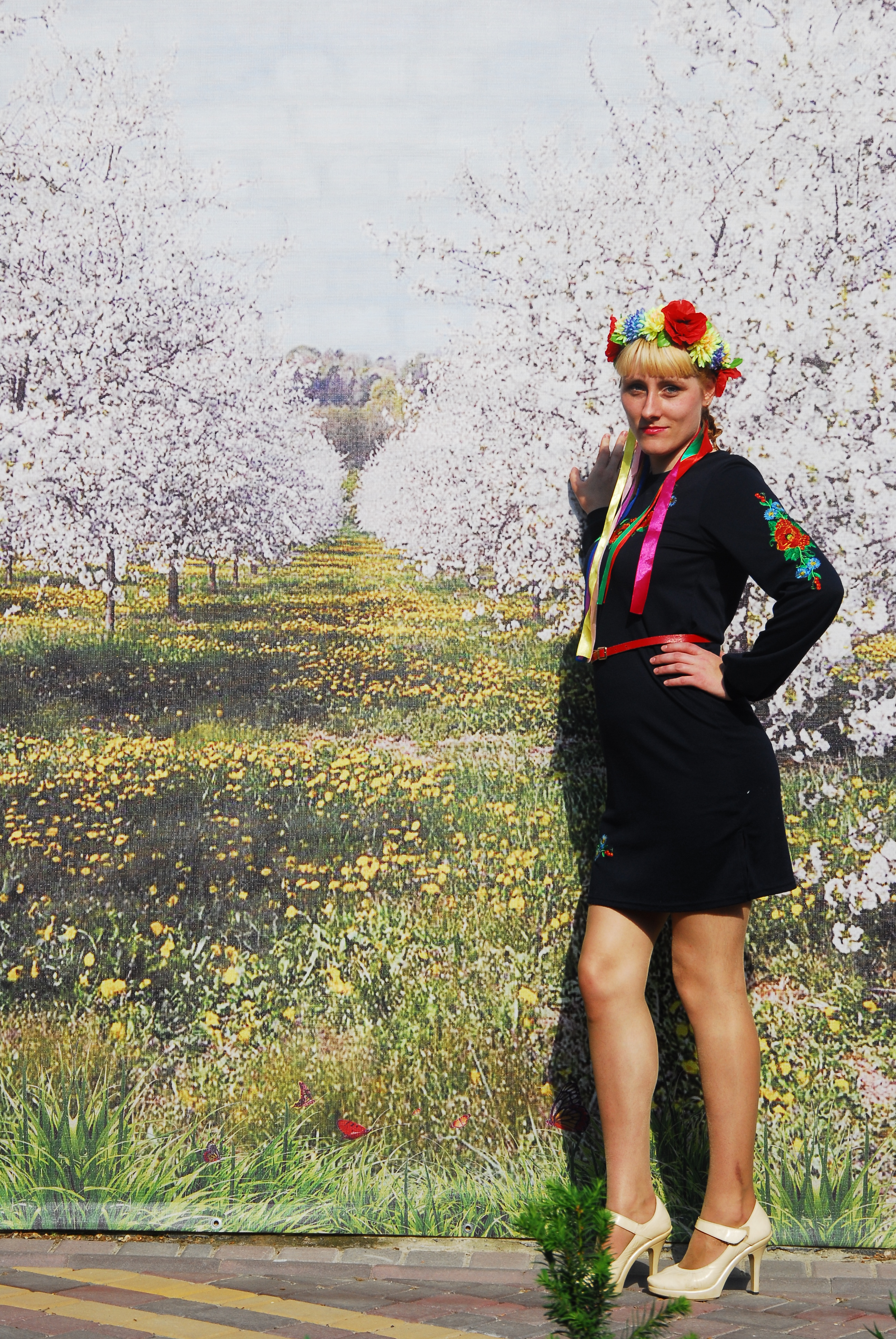 Мелитополь